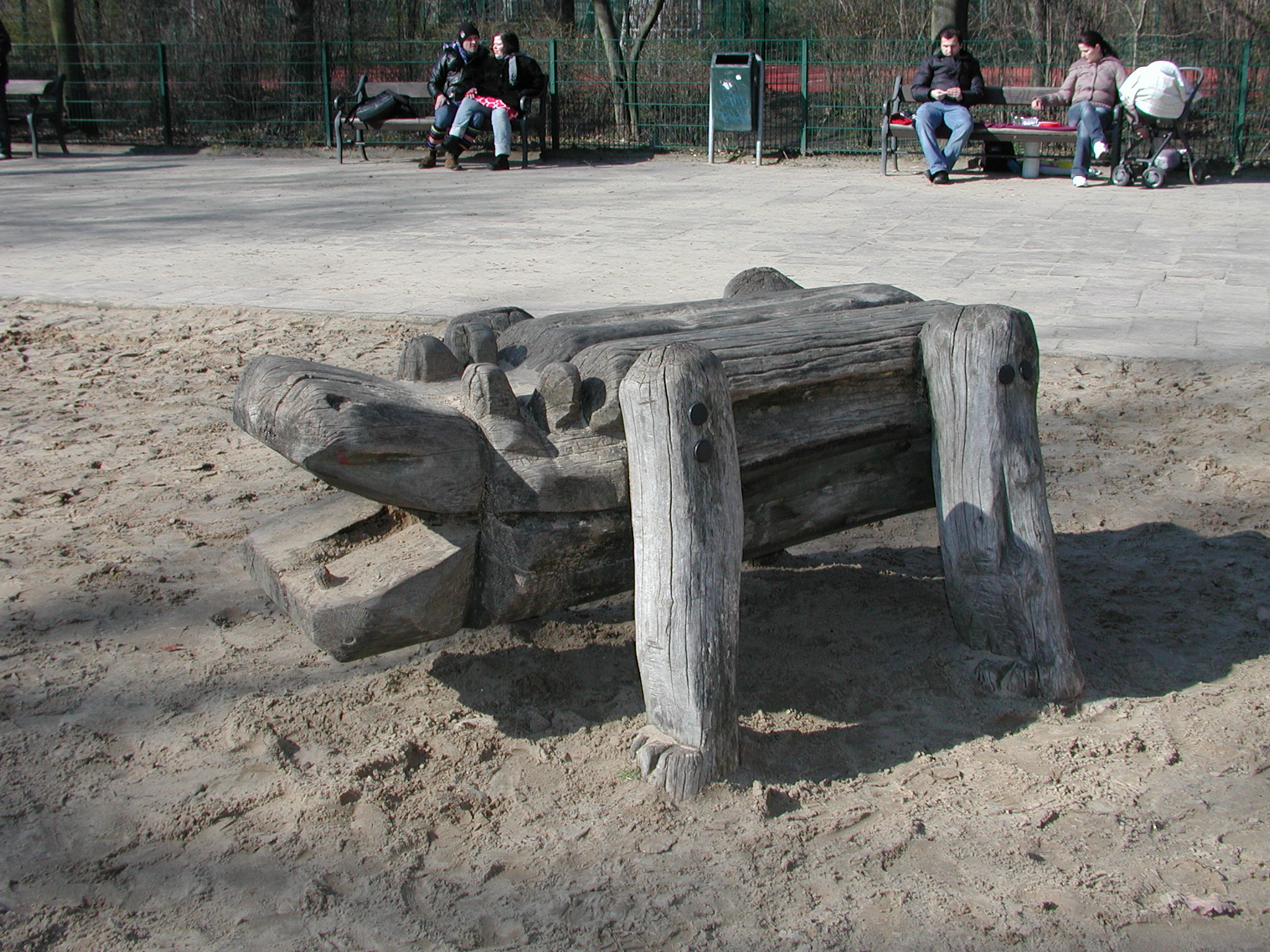 Holzfigur von Günter Schumann im Stadtpark Lichtenberg